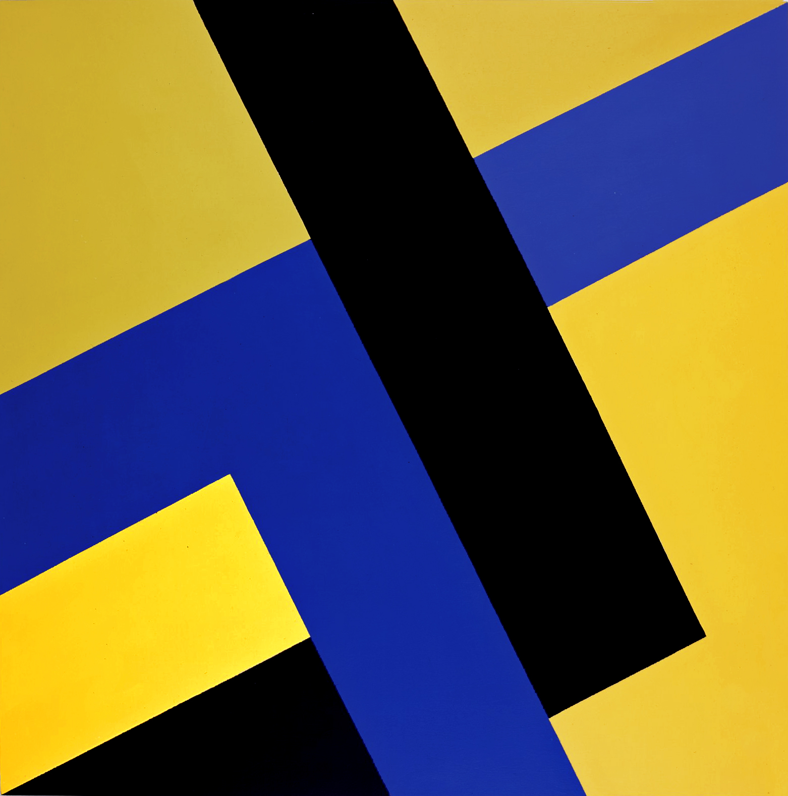 Friedrich Kracht: „Elementekombination“. Acrylbild, Gemälde